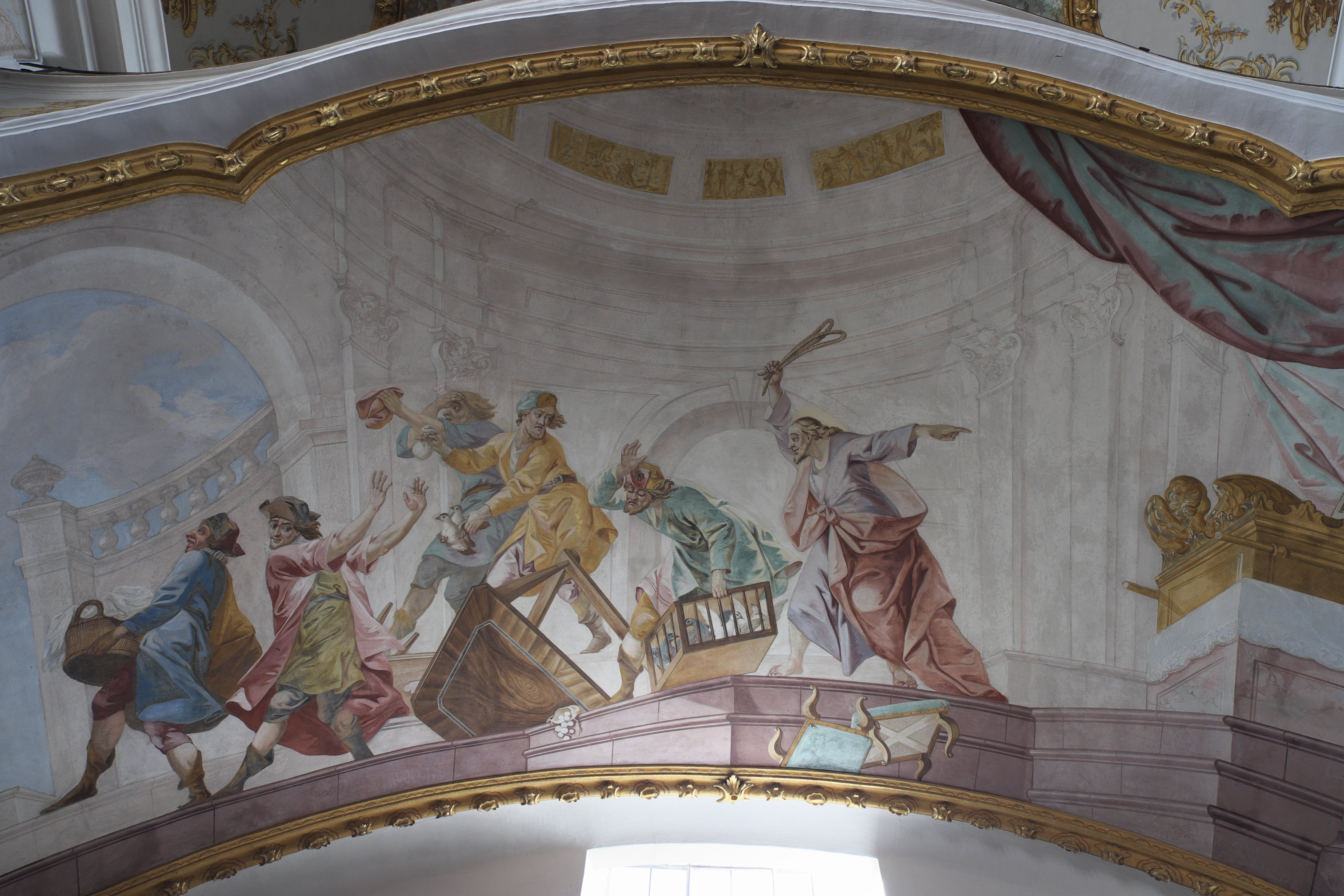 Katholische Pfarrkirche St. Vitus in Kirchweidach im Landkreis Altötting (Bayern/Deutschland), Emporenfresko von Franz Joseph Soll; Jesus vertreibt die Händler aus dem Tempel